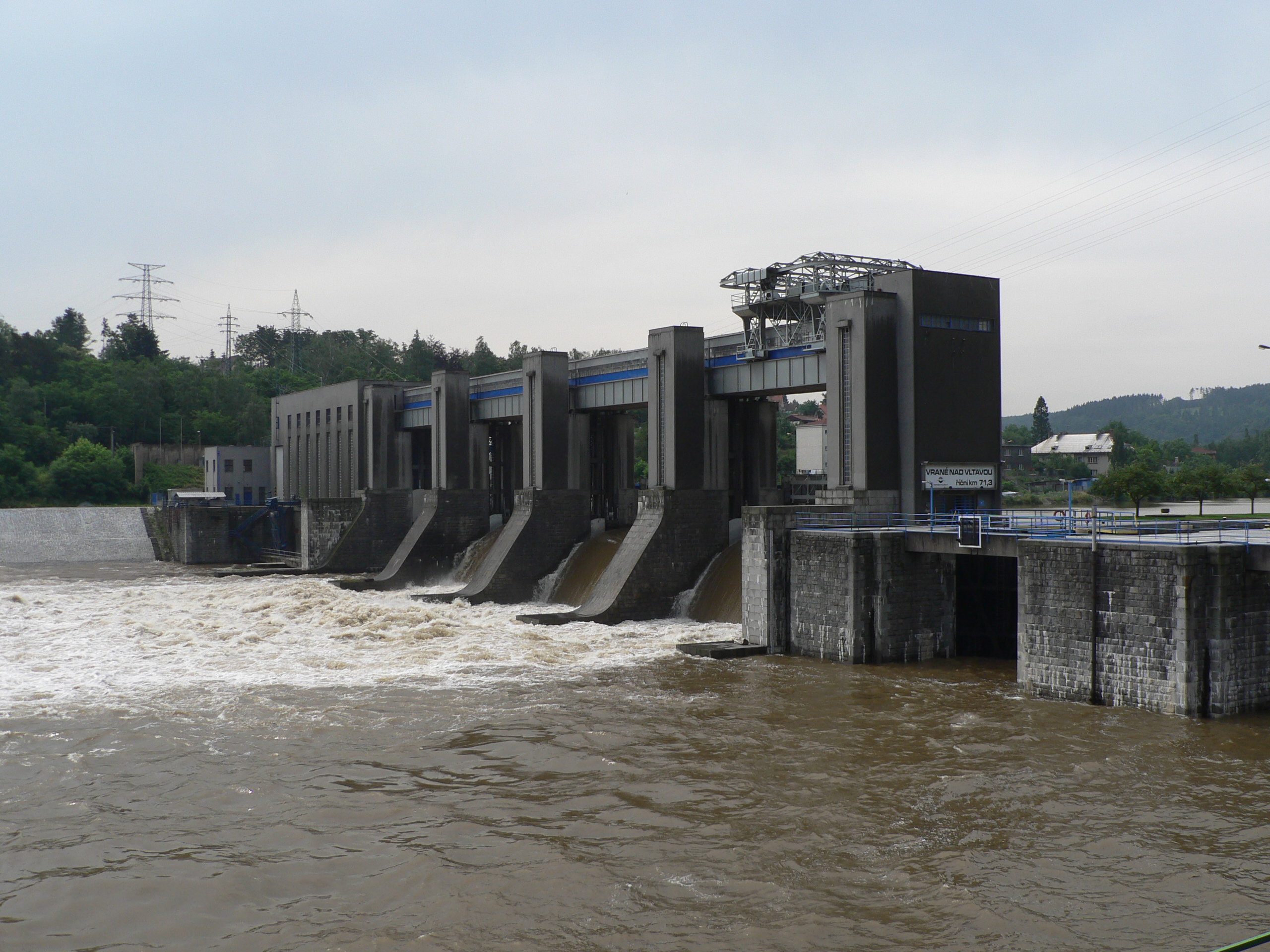 Dam_Vrane_nad_Vltavou, Czech Republic